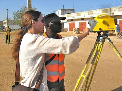 Réalisation d'une base de données cartographiques urbaines sur les 7 villes principales du Sénégal. Nivellement.